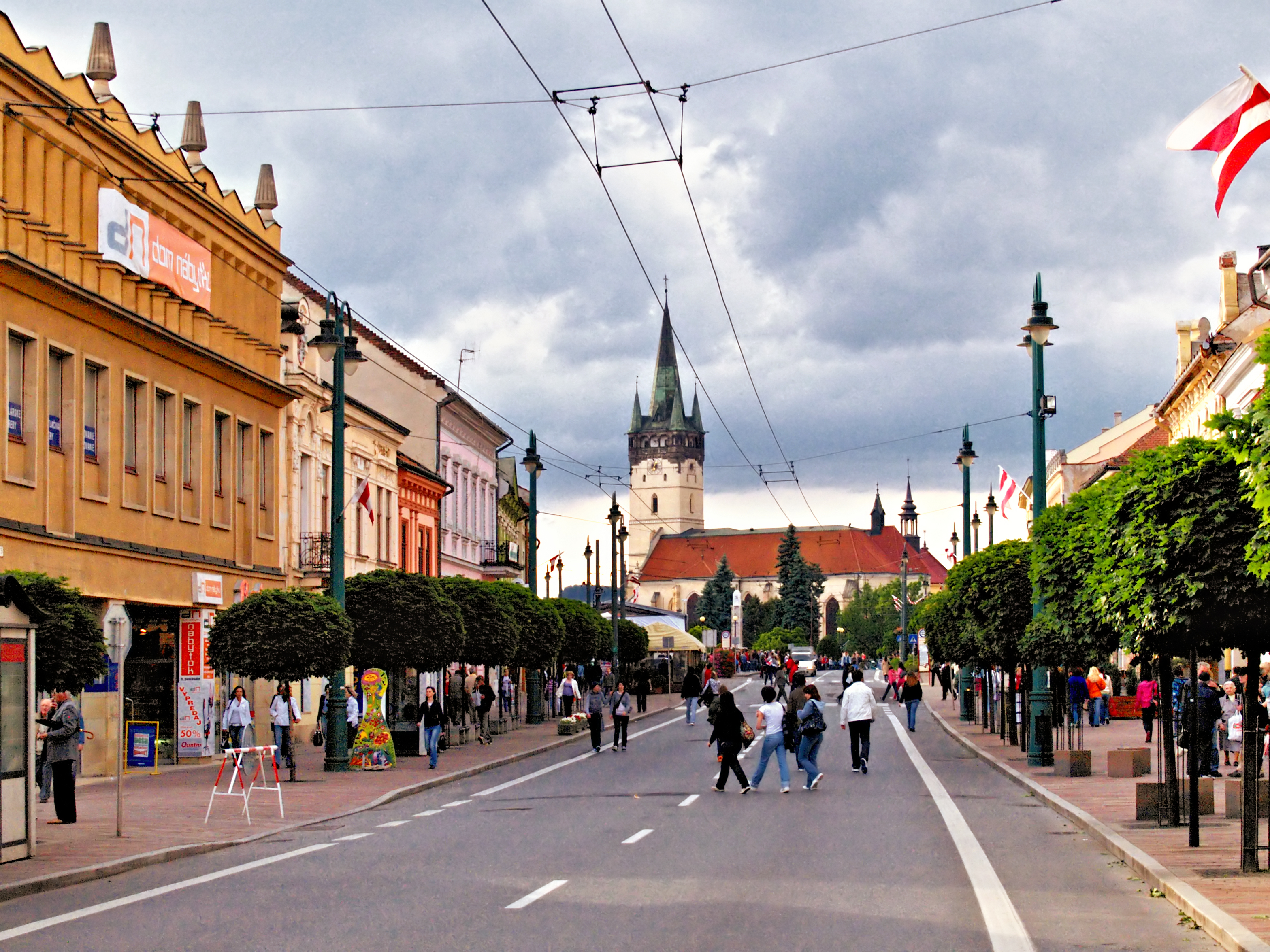 Prešov - Rue principale Hlvanà